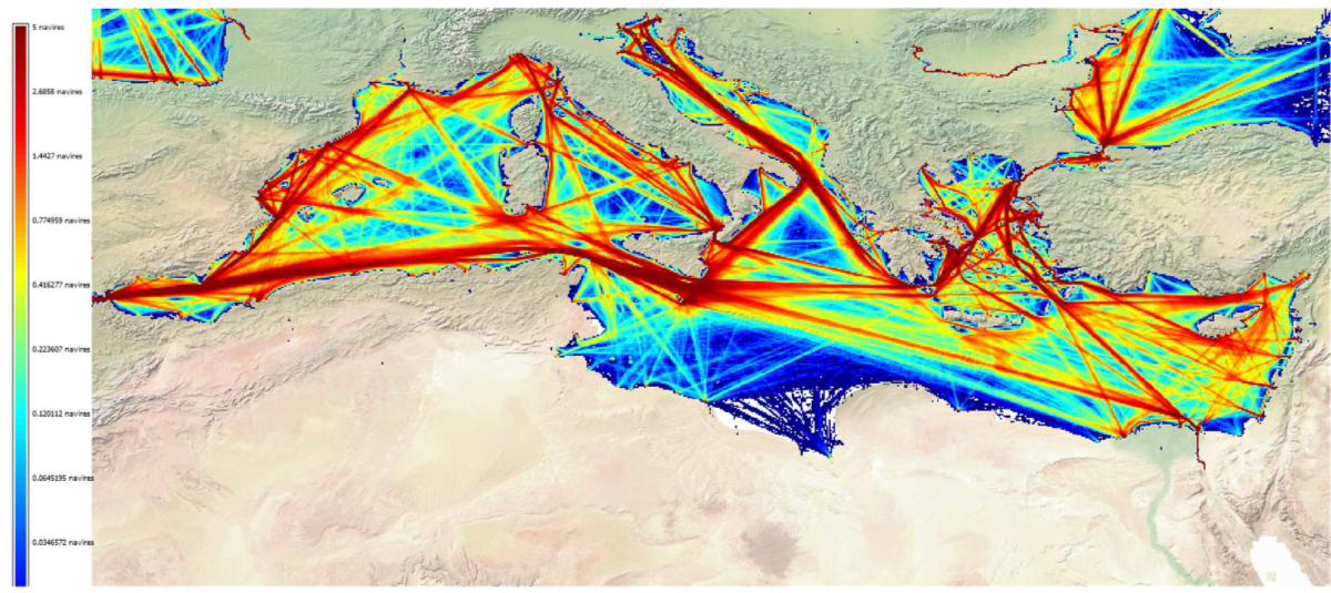 Extraite par la base de donnée AIS